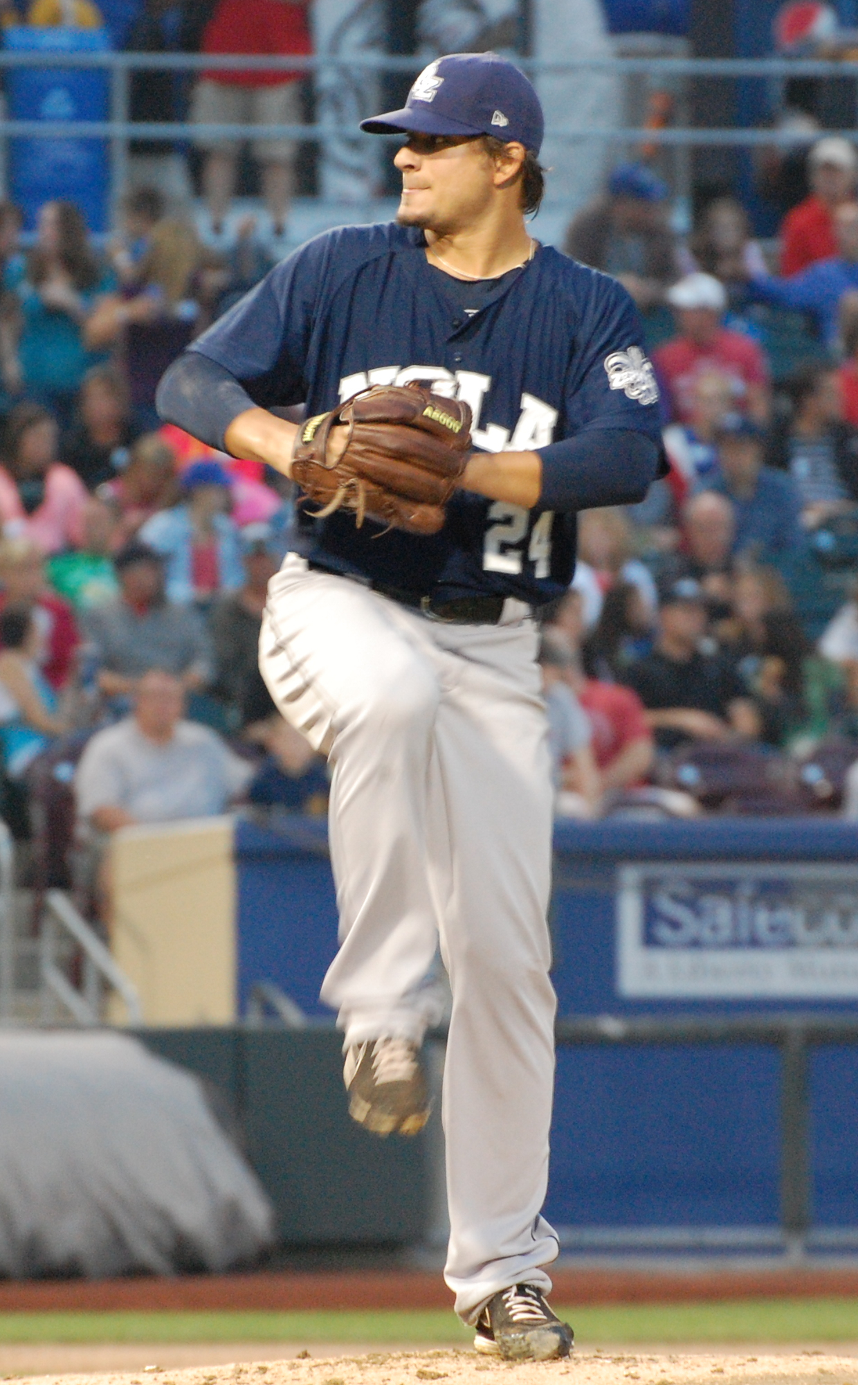 Brad Hand